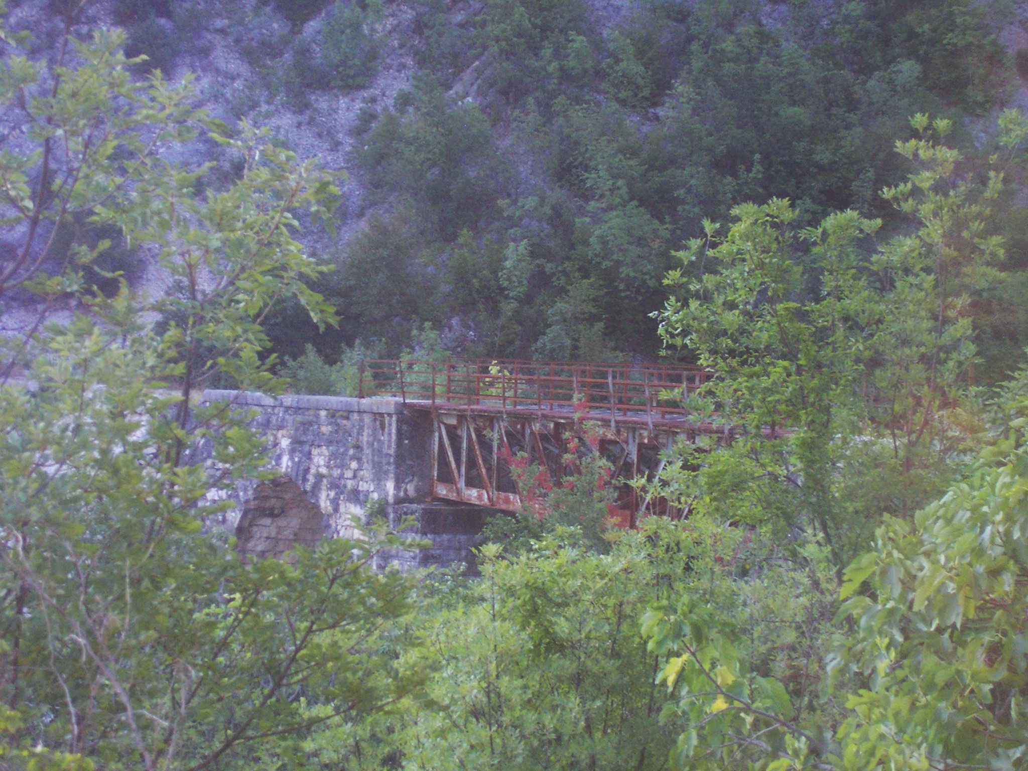 Štangerova ćuprija